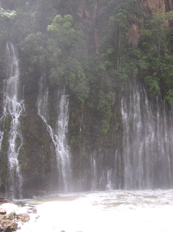 Cascada de la Tzararacua